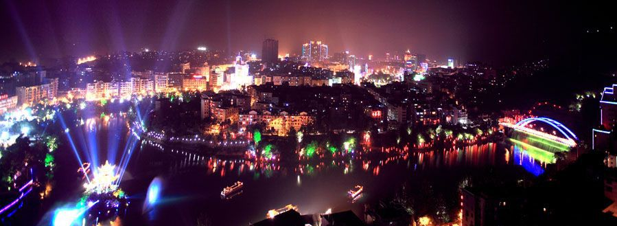 贵州省铜仁市碧江区夜景航拍